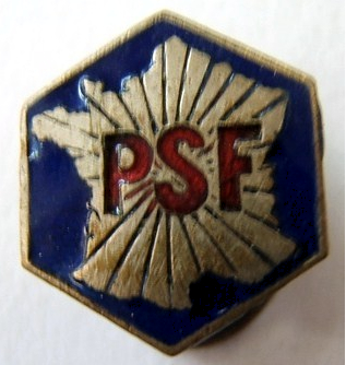 Insigne du Parti Social Français du Colonel de La Rocque. Années 1930-1940)